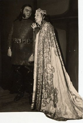 Shakespeare, William: Macbeth. Társulat: Nemzeti Színház, Budapest. Bemutató: 1931.04.28. Rendező: Hevesi Sándor. Szereplők: Macbeth: Kiss Ferenc, Lady Macbeth: Hettyey Aranka.